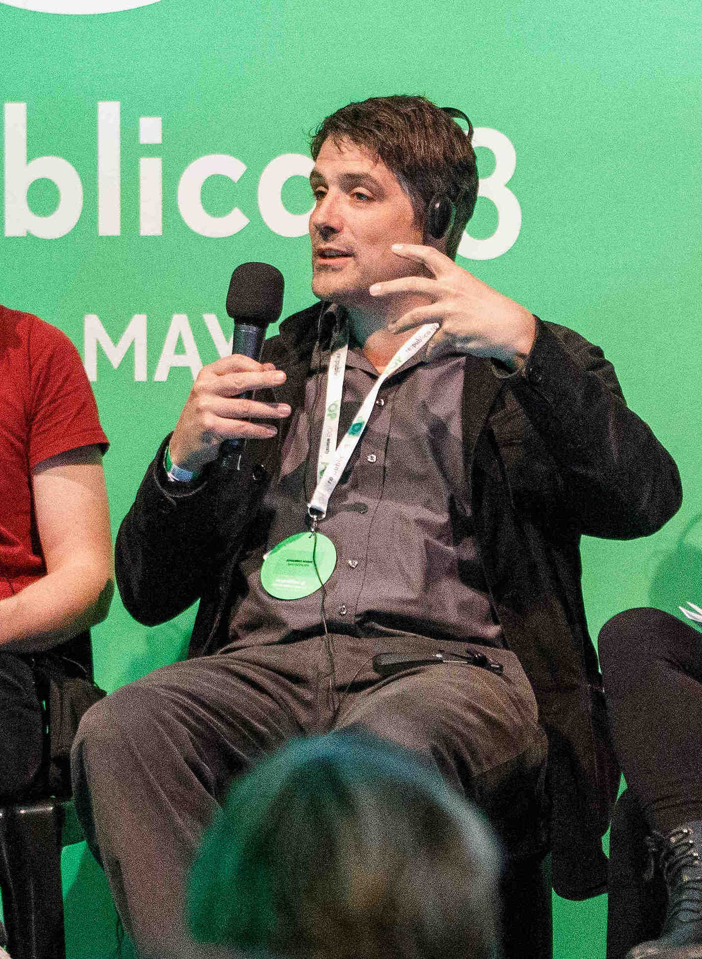 04.05.2018, Berlin: Discussion: Kunst & Protest: 1000 GESTALTEN auf dem G20-Gipfel Speaker: Marc Nikoleit, Gudrun Schoppe, Johannes Naber Kai Schächtele Die re:publica ist eine der weltweit wichtigsten Konferenzen zu den Themen der digitalen Gesellschaft und findet in diesem Jahr vom 02. bis 04. Mai in der STATION-Berlin statt. Foto: Jan Michalko/re:publica